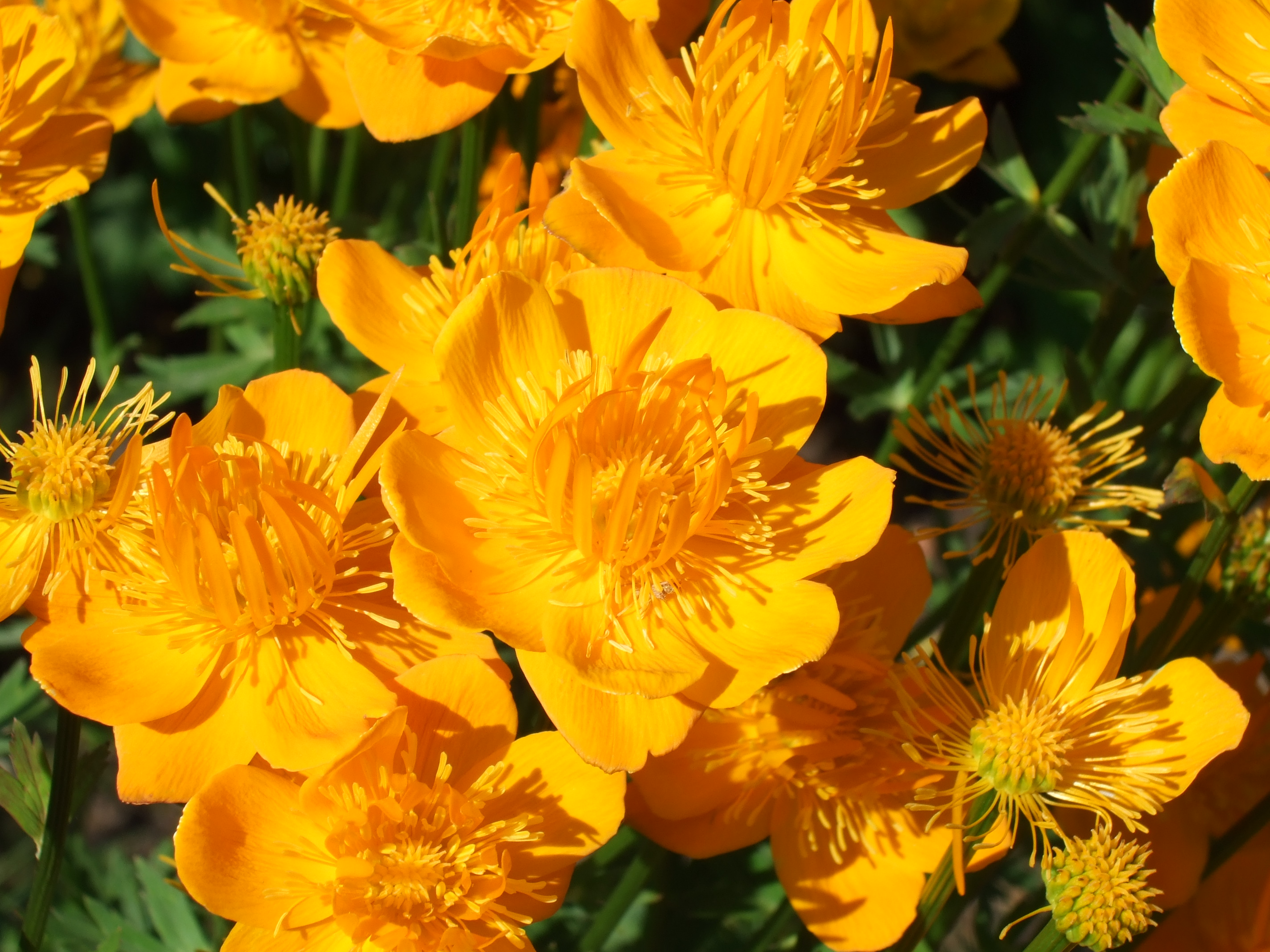 Schloss Hohenheim - Trollius chinensis Chinesische Trollblume